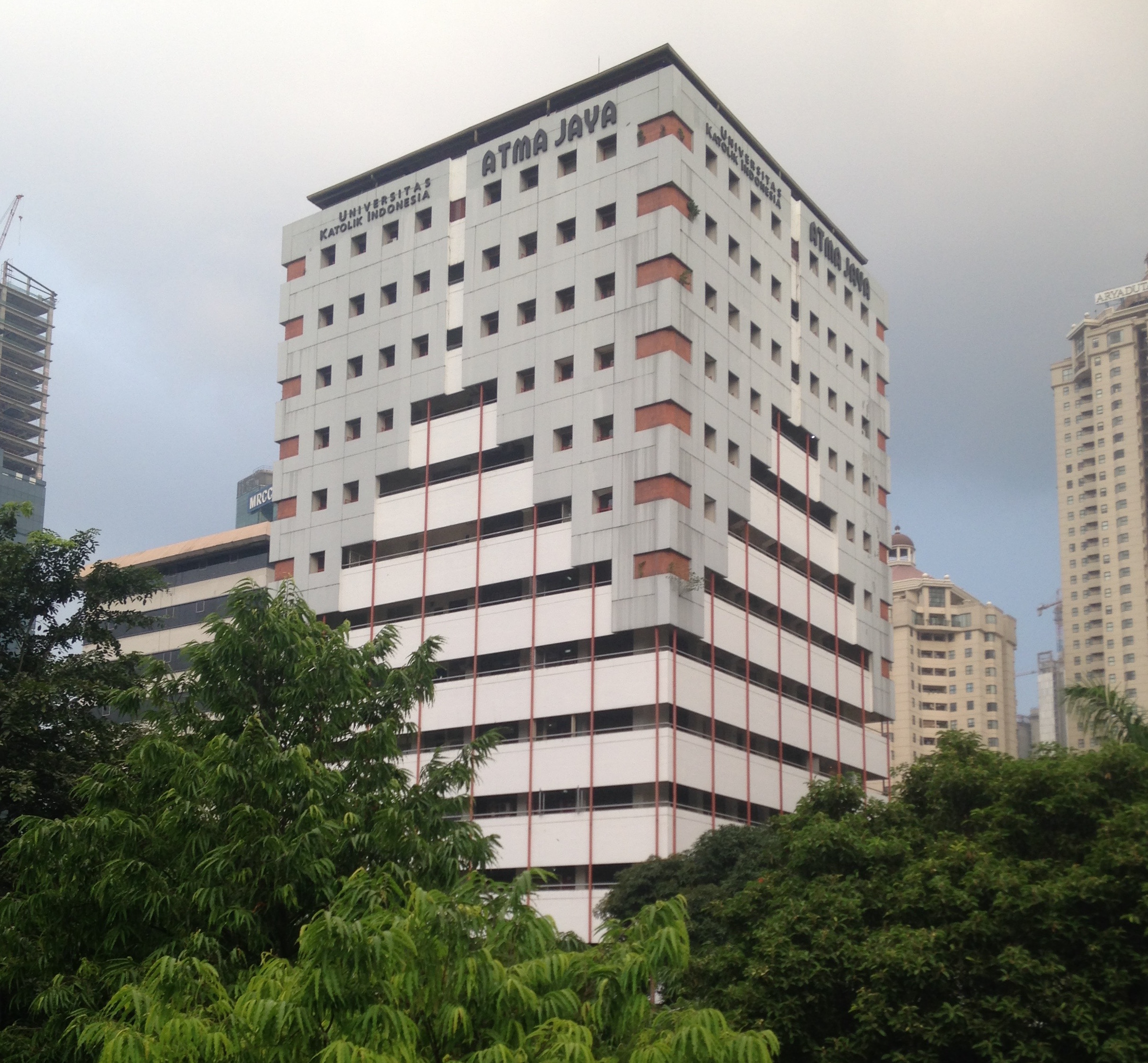 Uniwersytet Atma Jaya